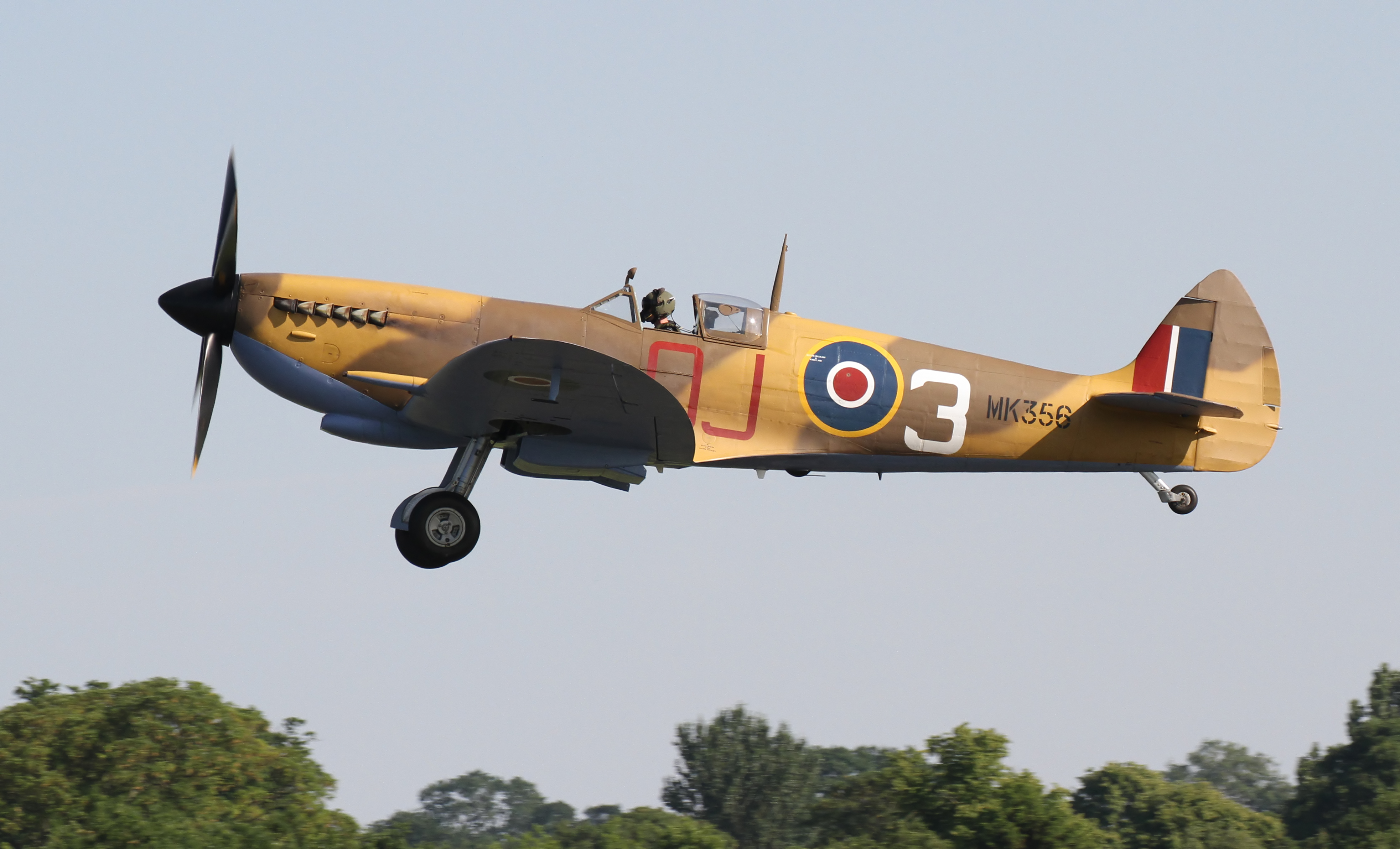 Supermarine Spitfire LF Mk IXc - MK356